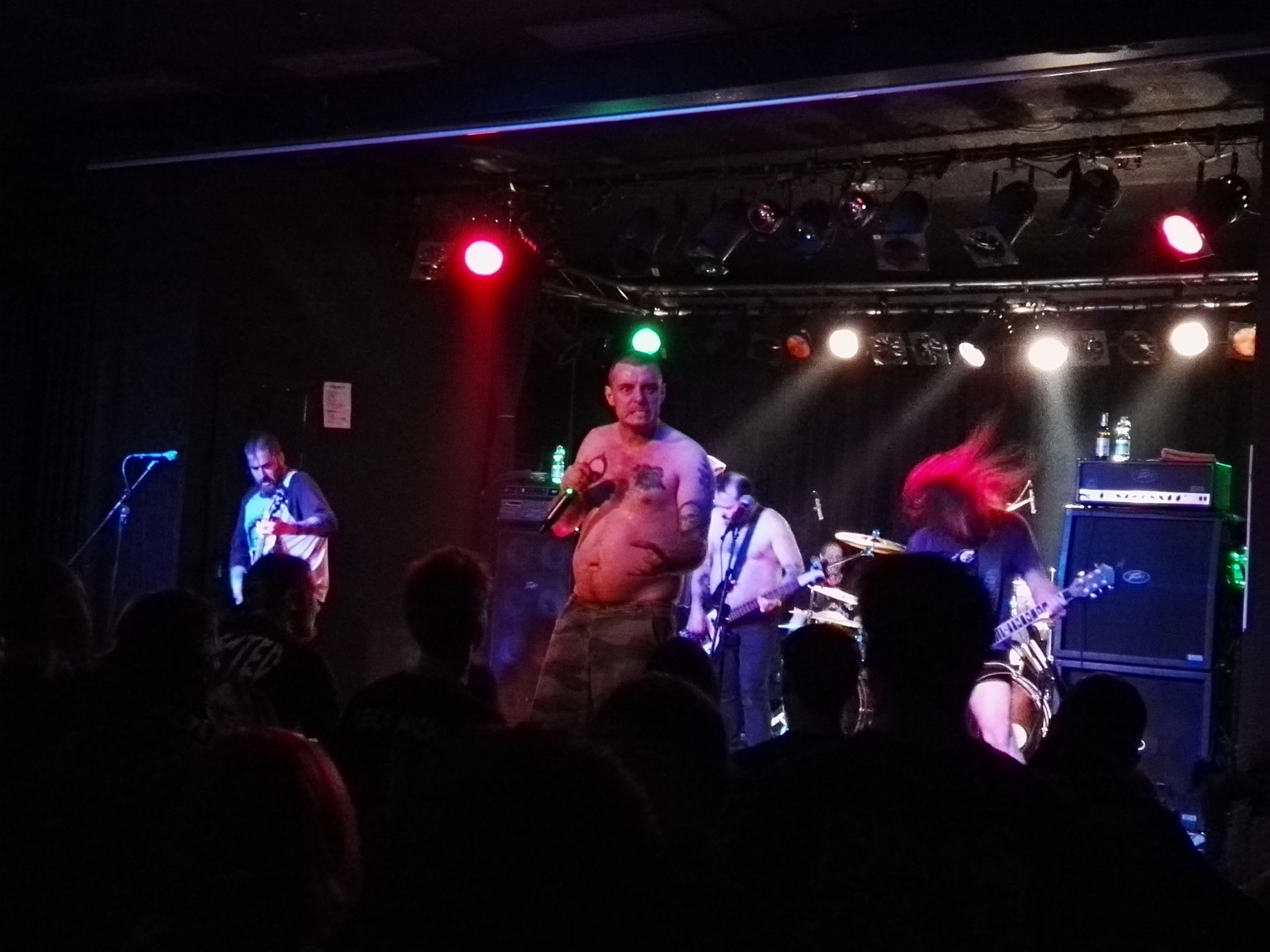 Band Lody Kong in der Scheune in Dresden